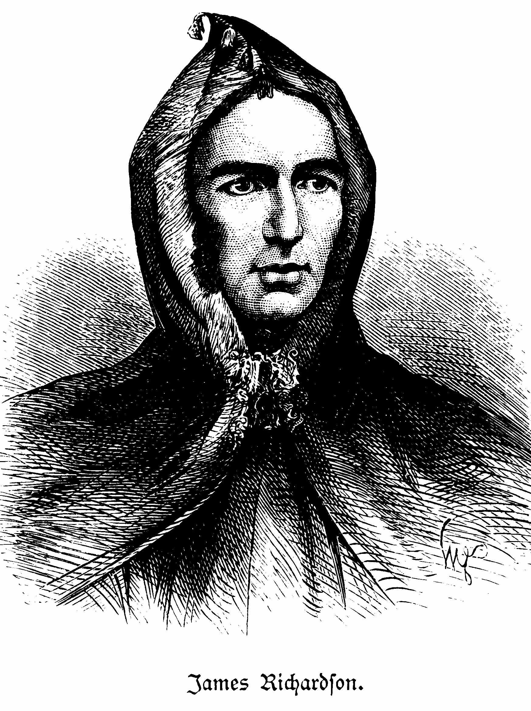 Porträt von James Richardson